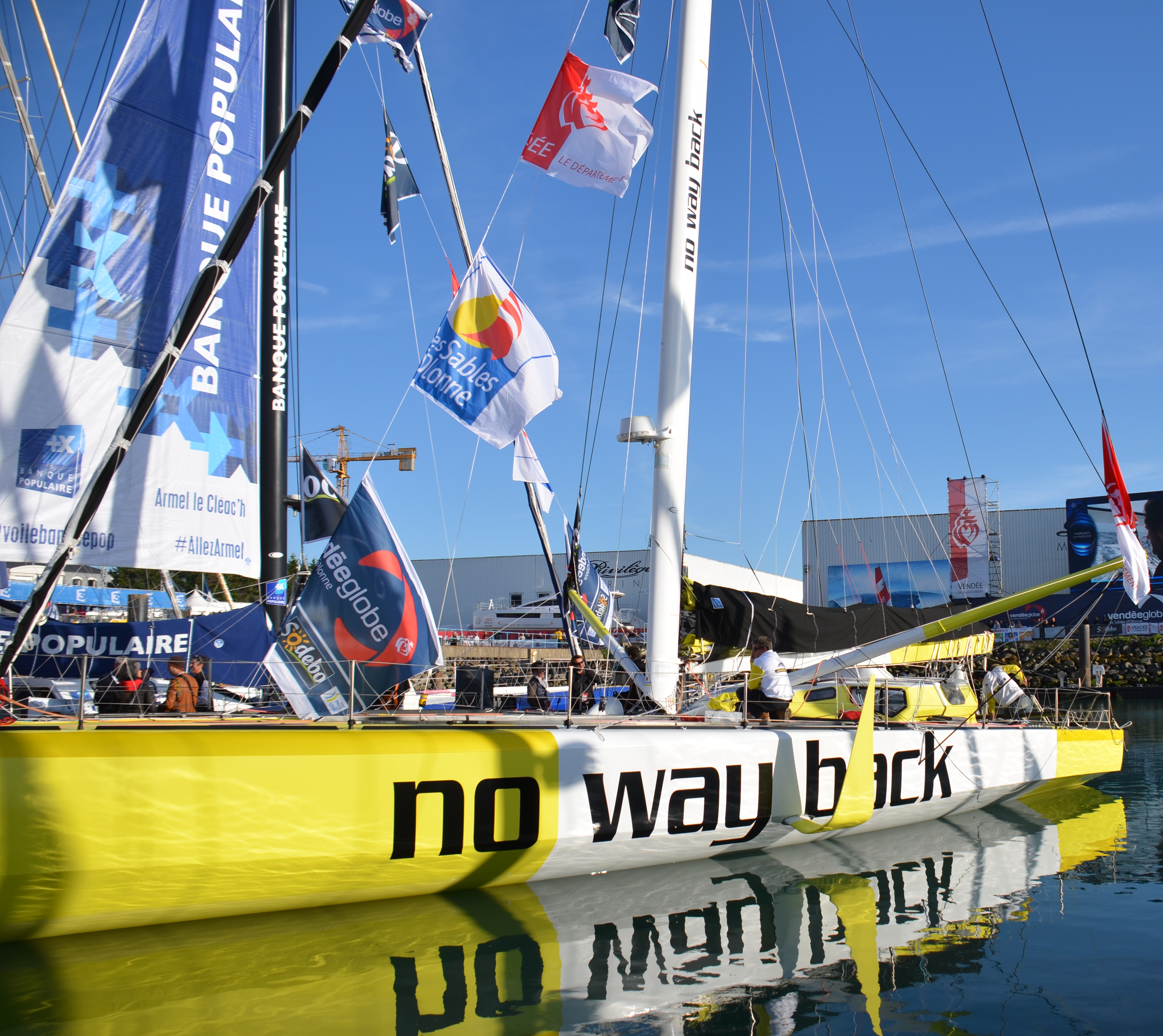 No Way Back